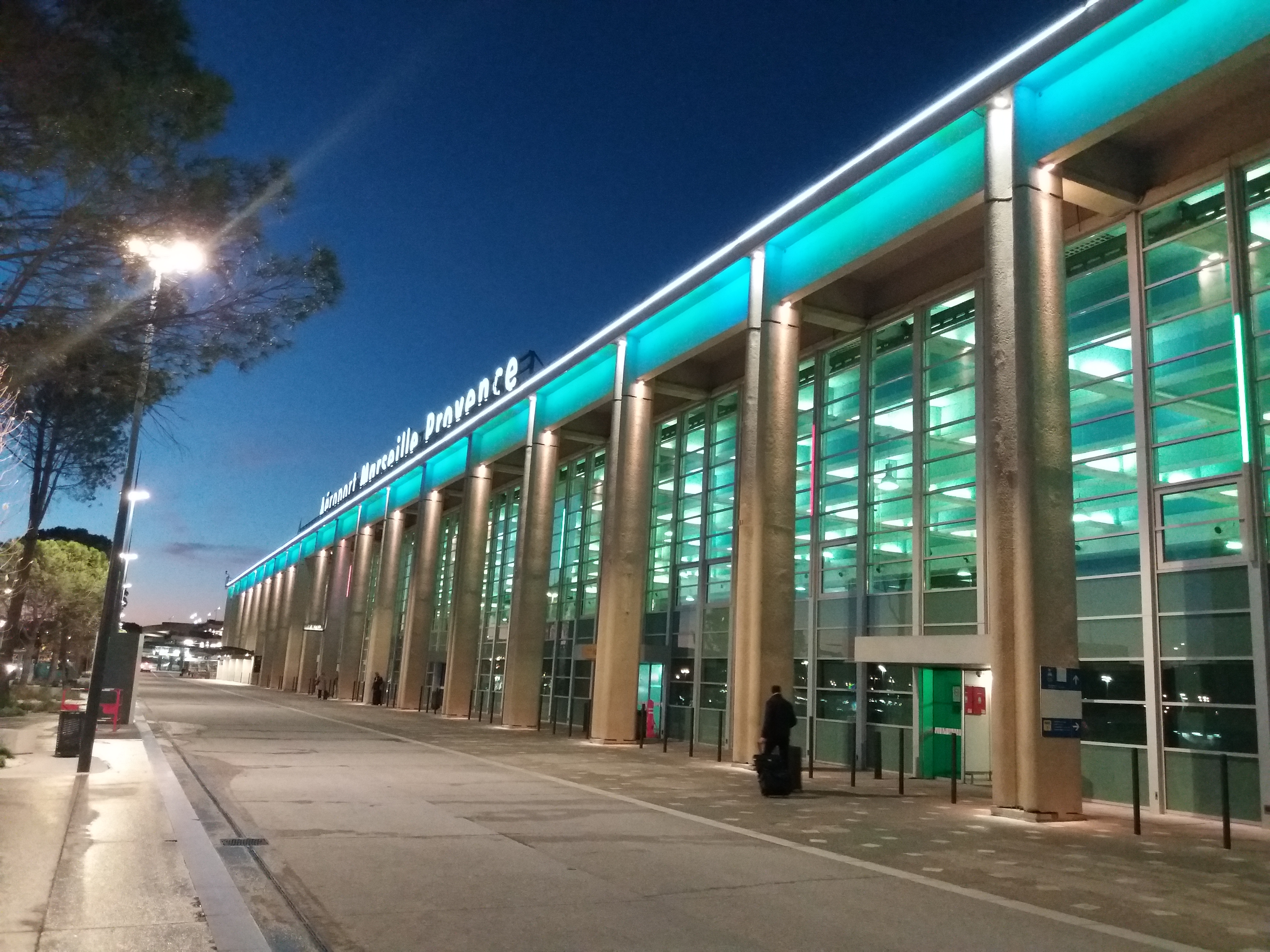 L'aéroport Marseille-Provence (France)